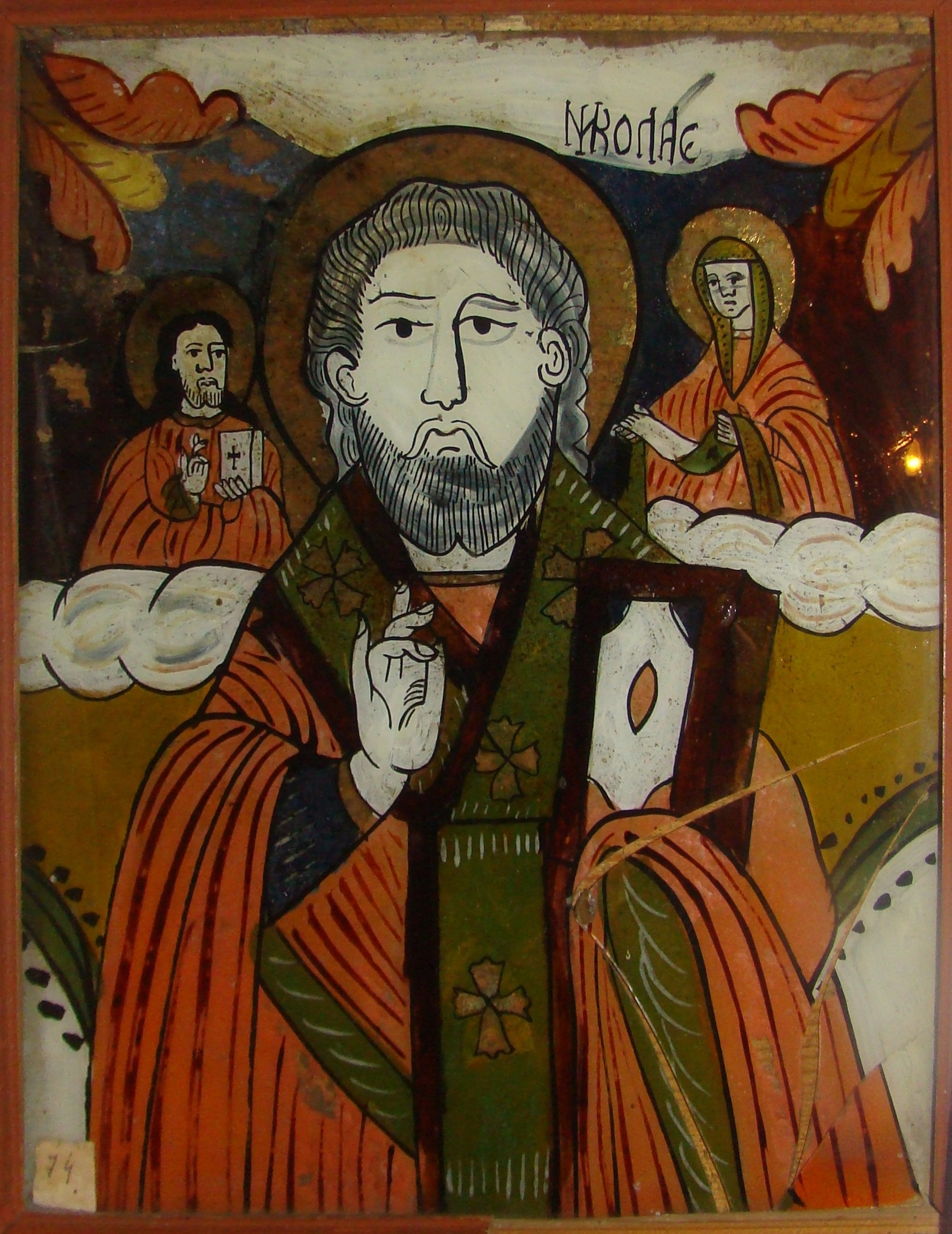 Biserica de lemn „Înălțarea Sfintei Cruci” din Bălcești, județul Cluj